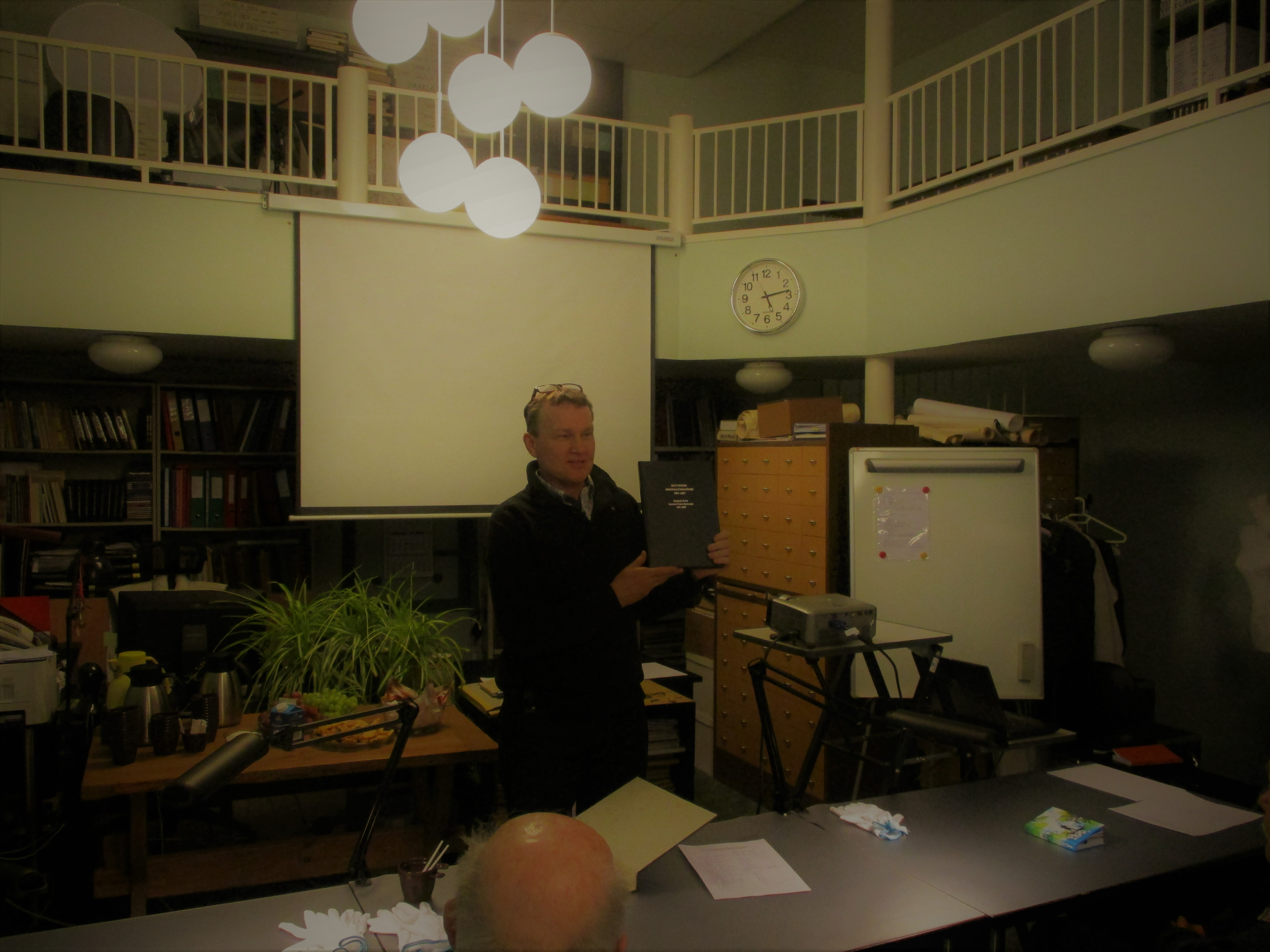 Viljandi Muuseumi direktor Jaak Pihlak rääkimas veebruaris 2018 kavandatava Viljandi muuseumi 140. sünnipäeva tähistamisest ja muuseumitööst. Viljandi Muuseumisõprade Seltsi ettekandeõhtu 21. veebruaril 2018 Viljandi Muuseumi lugemissaalis.